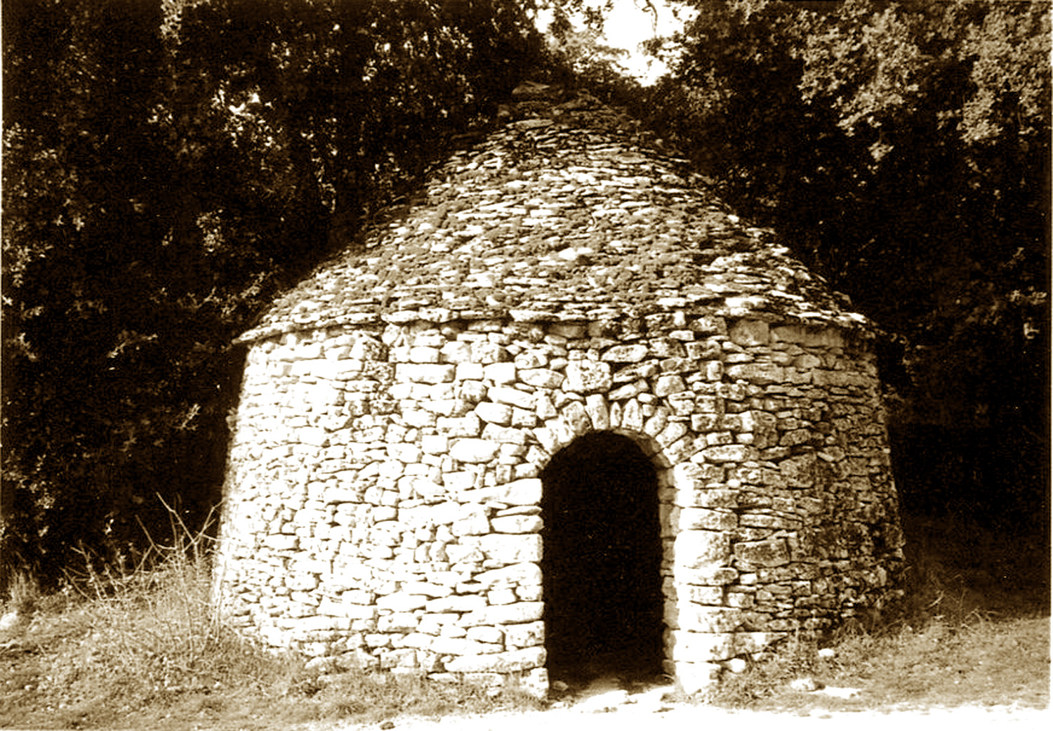 Cabanon pointu de l'ancien clos du monastère de Ganagobie dans les Alpes-de-Haute-Provence (France).